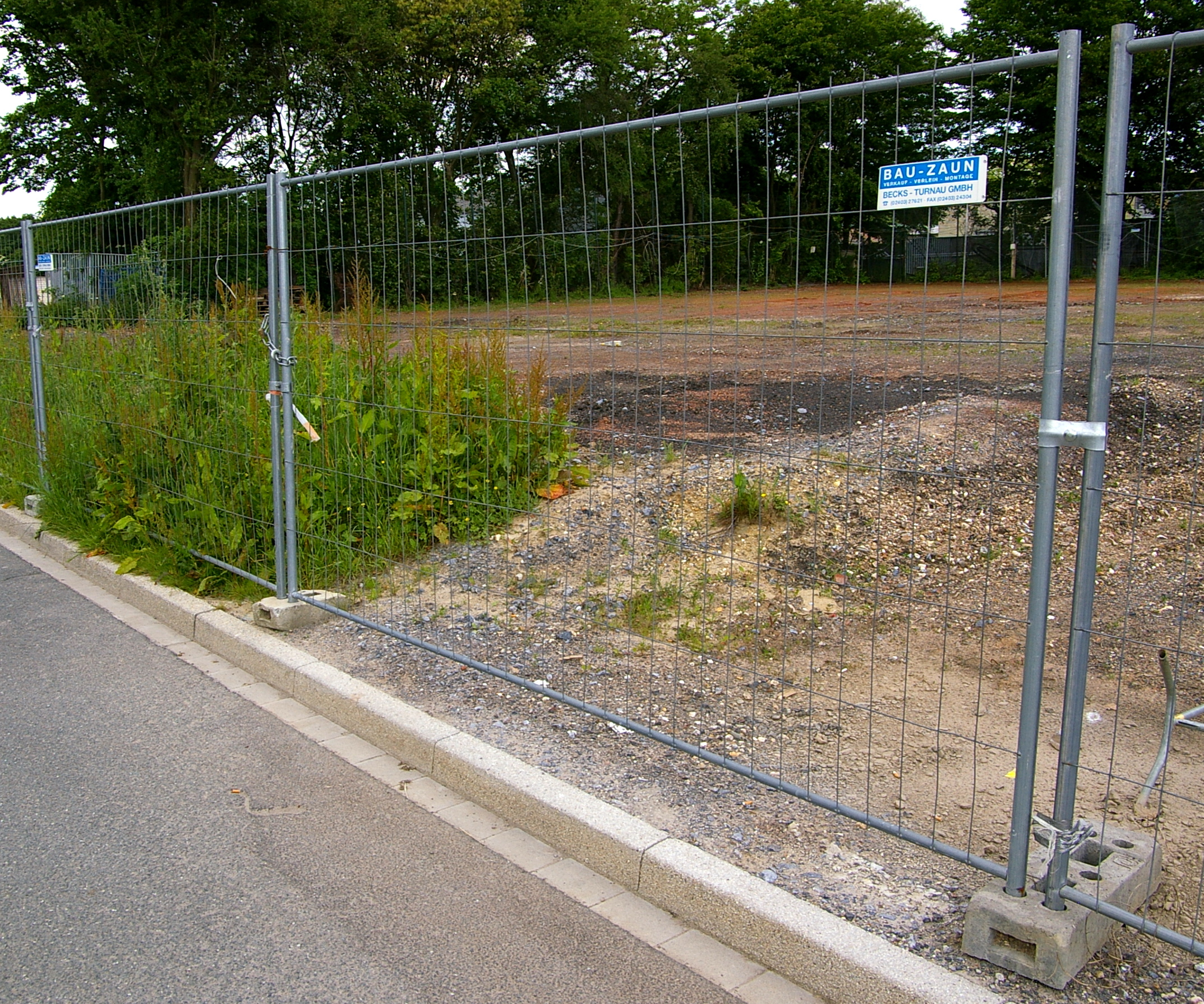 Einfacher Bauzaun